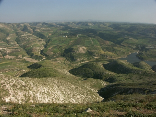 Ausgrabungen im Sommer 2007 am Tall Zira´a - Ausgrabung des BAI Wuppertal und DEI Jerusalem+Amman; und